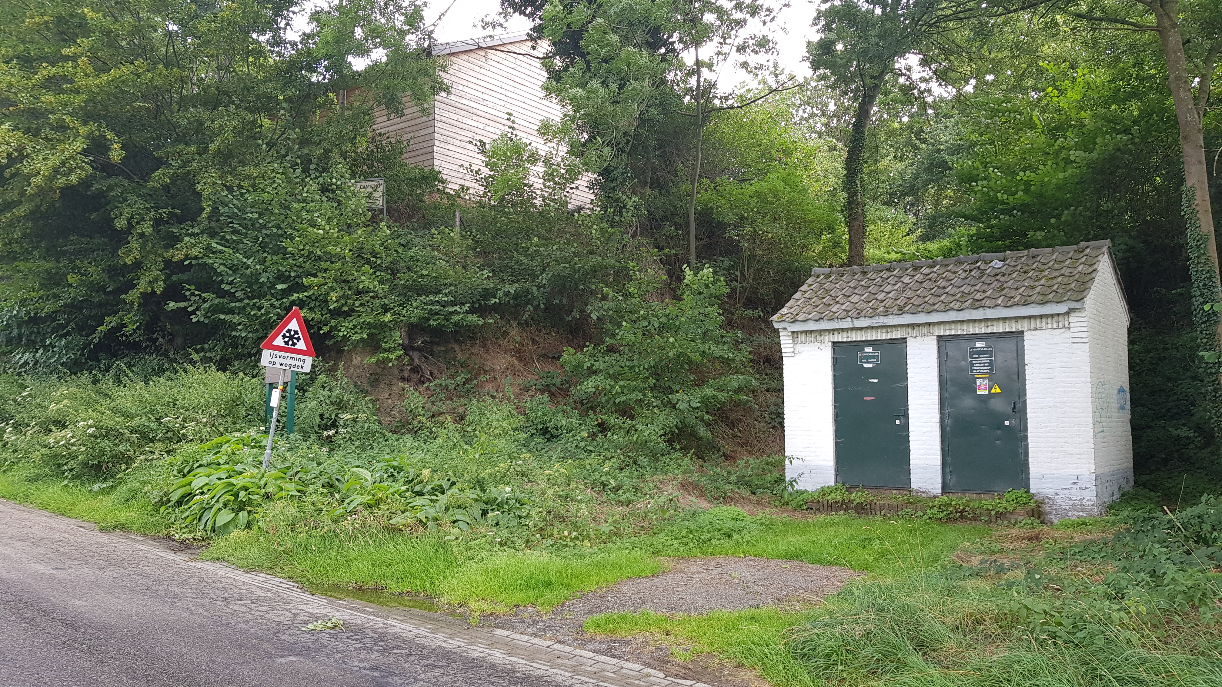 Geologisch monument Terziet, Epen, Gulpen-Wittem, Nederland